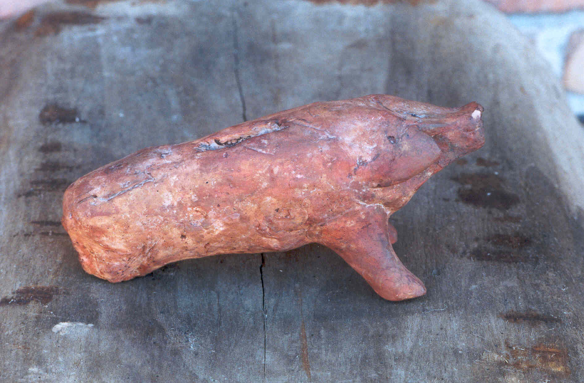 Nachbildung des ältesten Sparschweins aus Billeben /Thür., 1300 n. Chr.. Exponat aus dem Deutschen Schweinemuseum Ruhlsdorf.